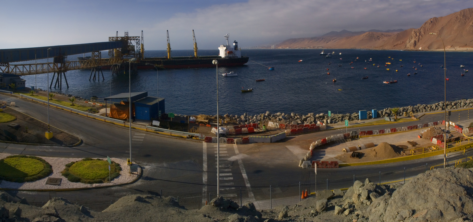 Coloso1